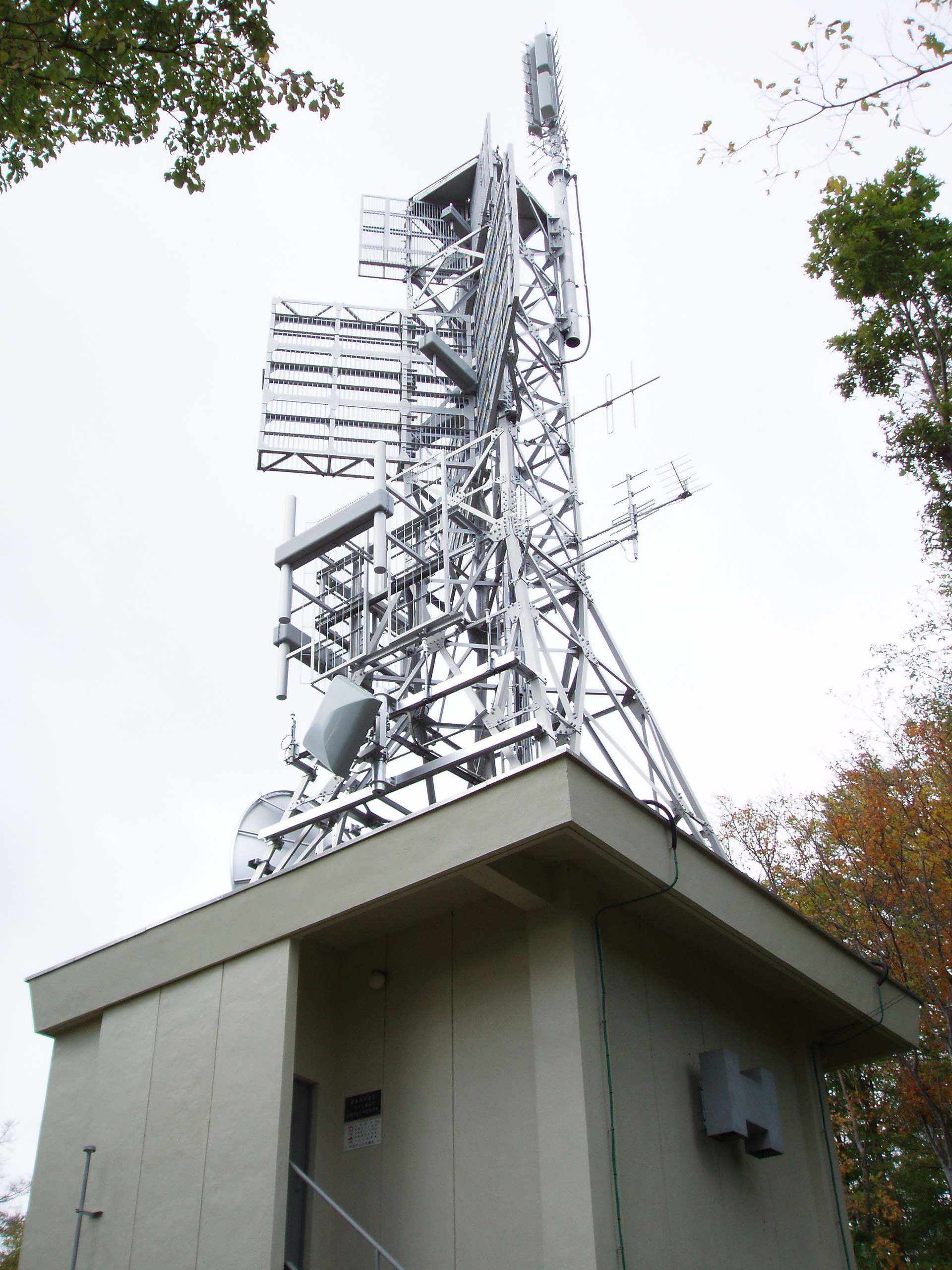 芦別中継局（NHK・HTB・UHB・TVhアナログ、全局デジタル）